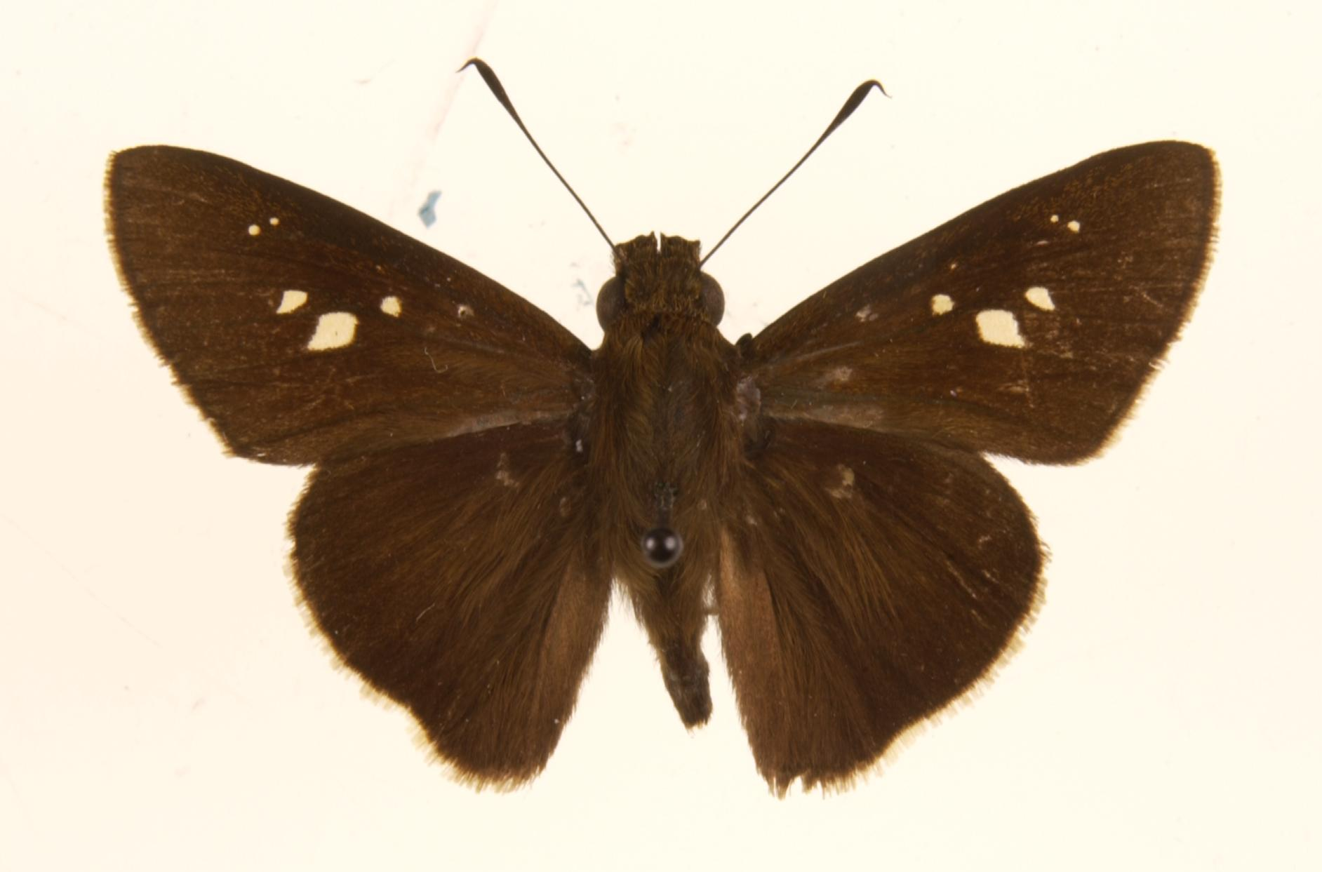 Caltoris cormasa